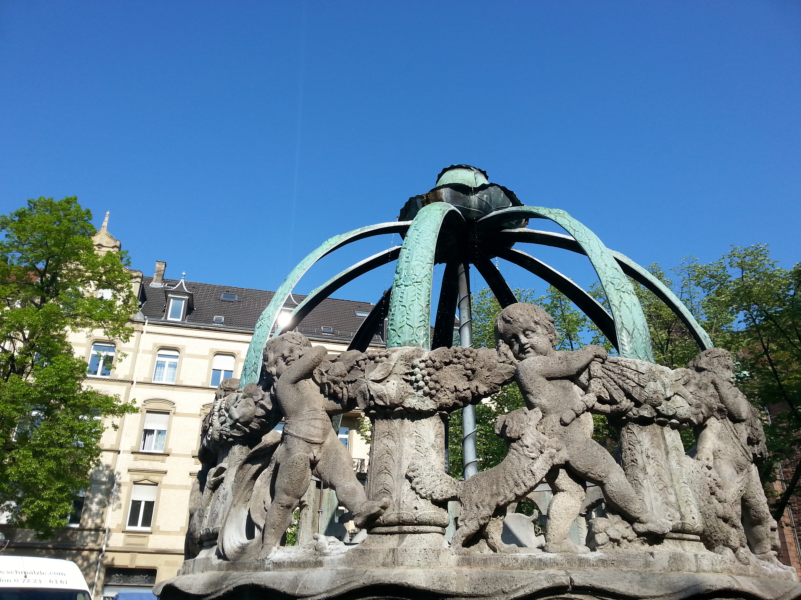 Detail des Brunnens